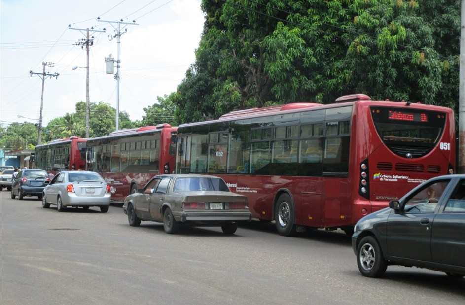 lola